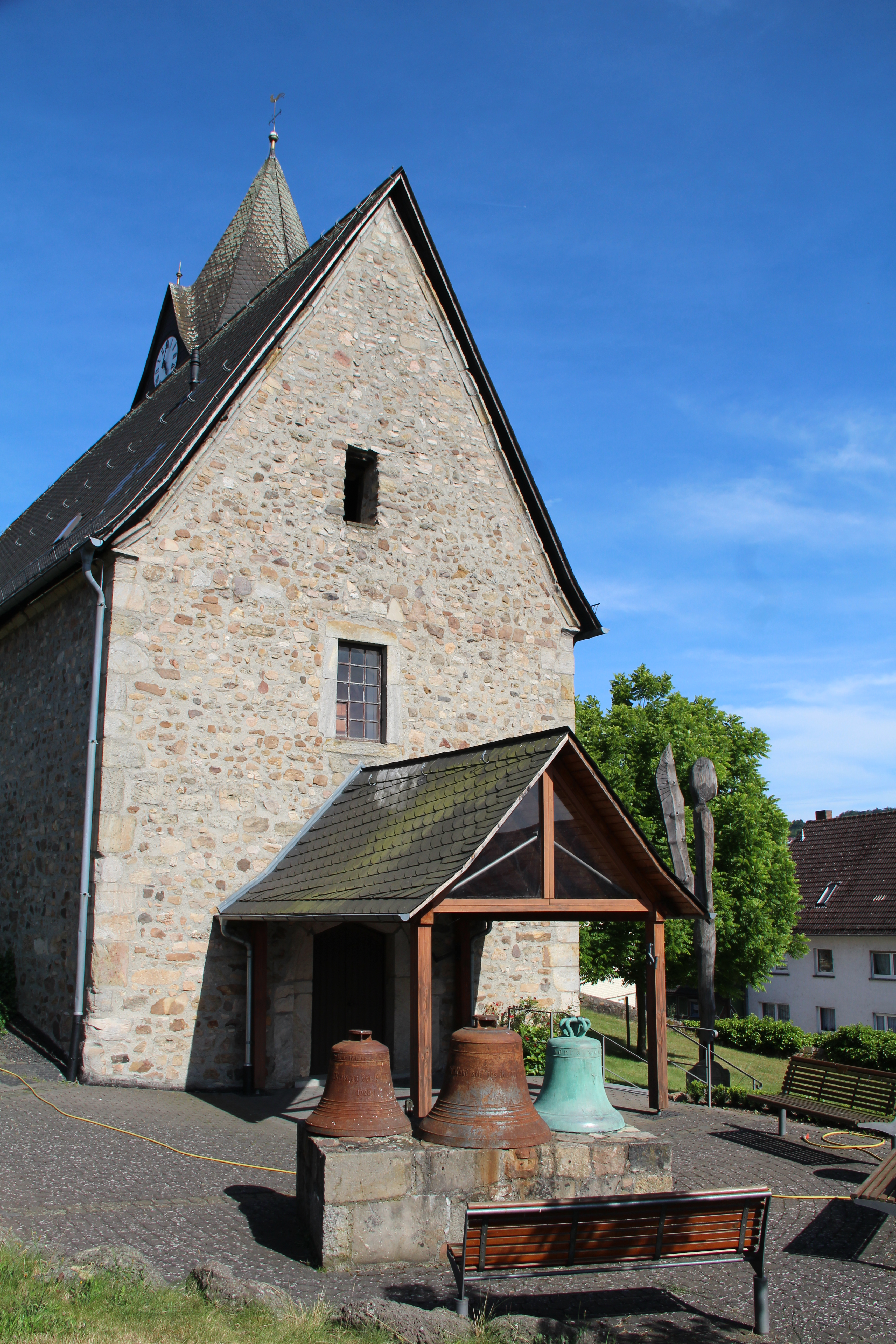 Glocken vor der Ev. Kirche von Treis an der Lumda.